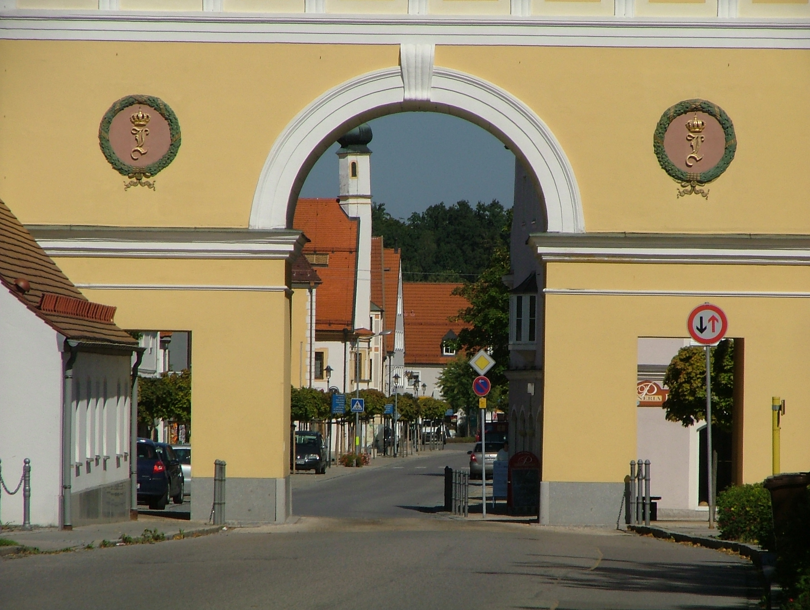 Stadttor